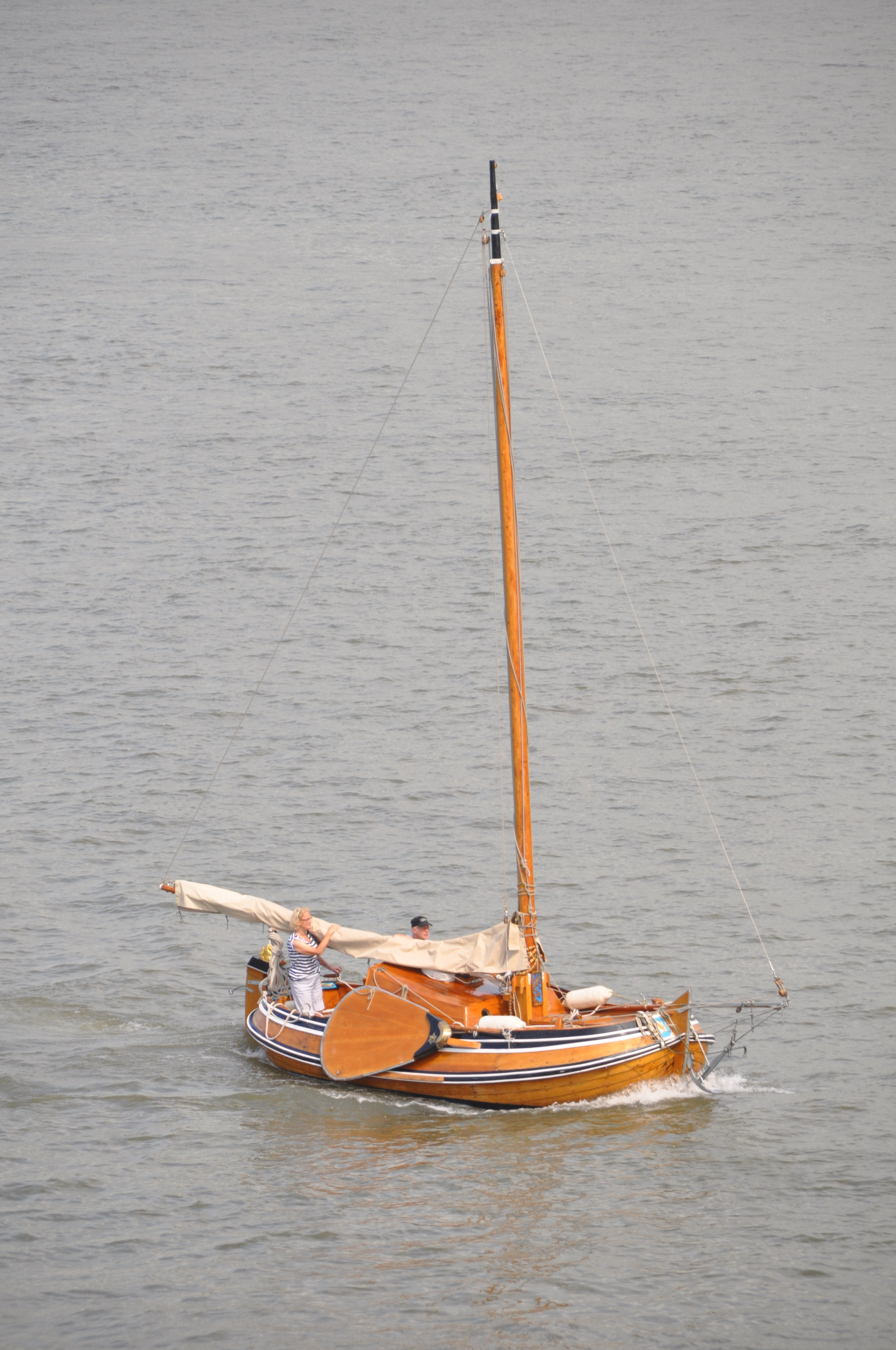 Een boeier opvarend onder de Merwedebrug bij Gorinchem